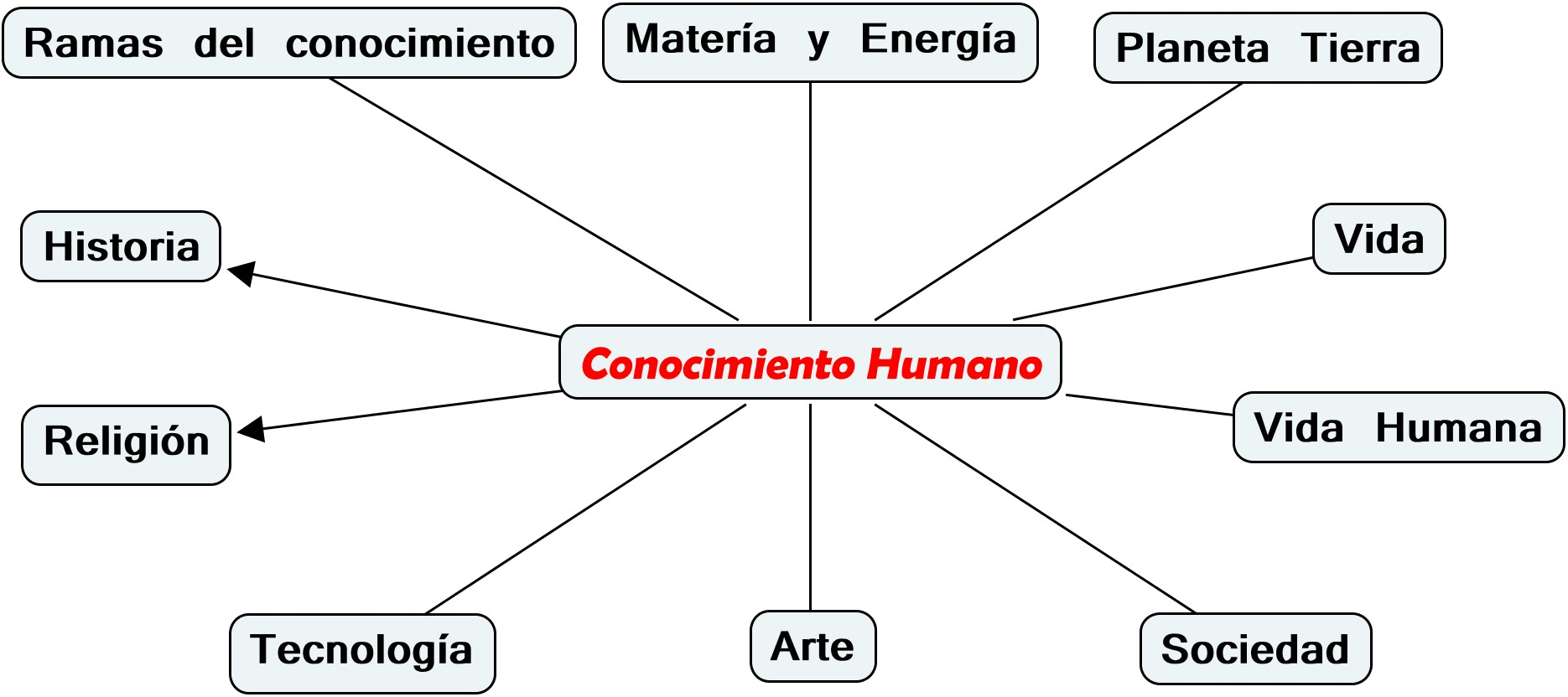 Desarrollo primario del esquema de Propædia con la primera división en 10 partes principales del conocimiento humano.